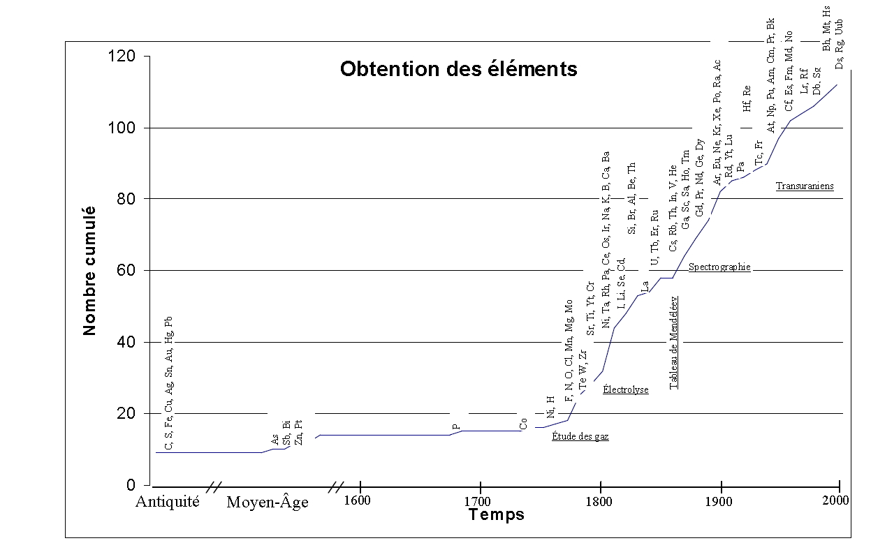 Ce graphique montre bien la longue période pendant laquelle les éléments connus ont été peu nombreux, puis à partir de la fin du xviiie siècle, l'accélération des découvertes par différentes approches.